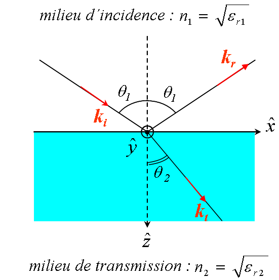 Schéma représentant la réflexion-transmission d'une onde plane électromagnétique lors d'un changement de milieu.